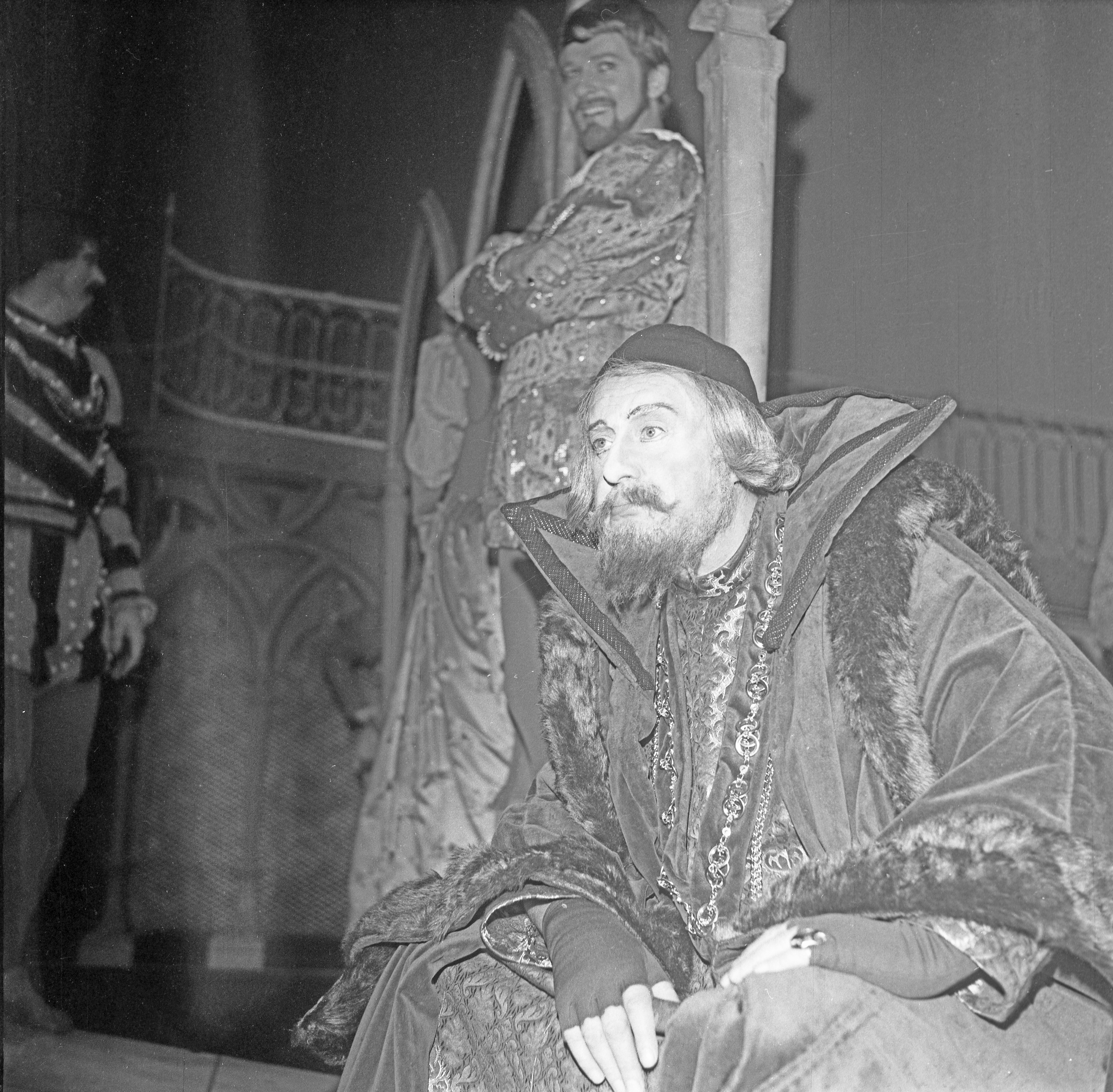 Norske skådespelaren Svend Soot von Düring som Shylock i Köpmannen i Venedig på Den Nationale Scene i Bergen 1969.